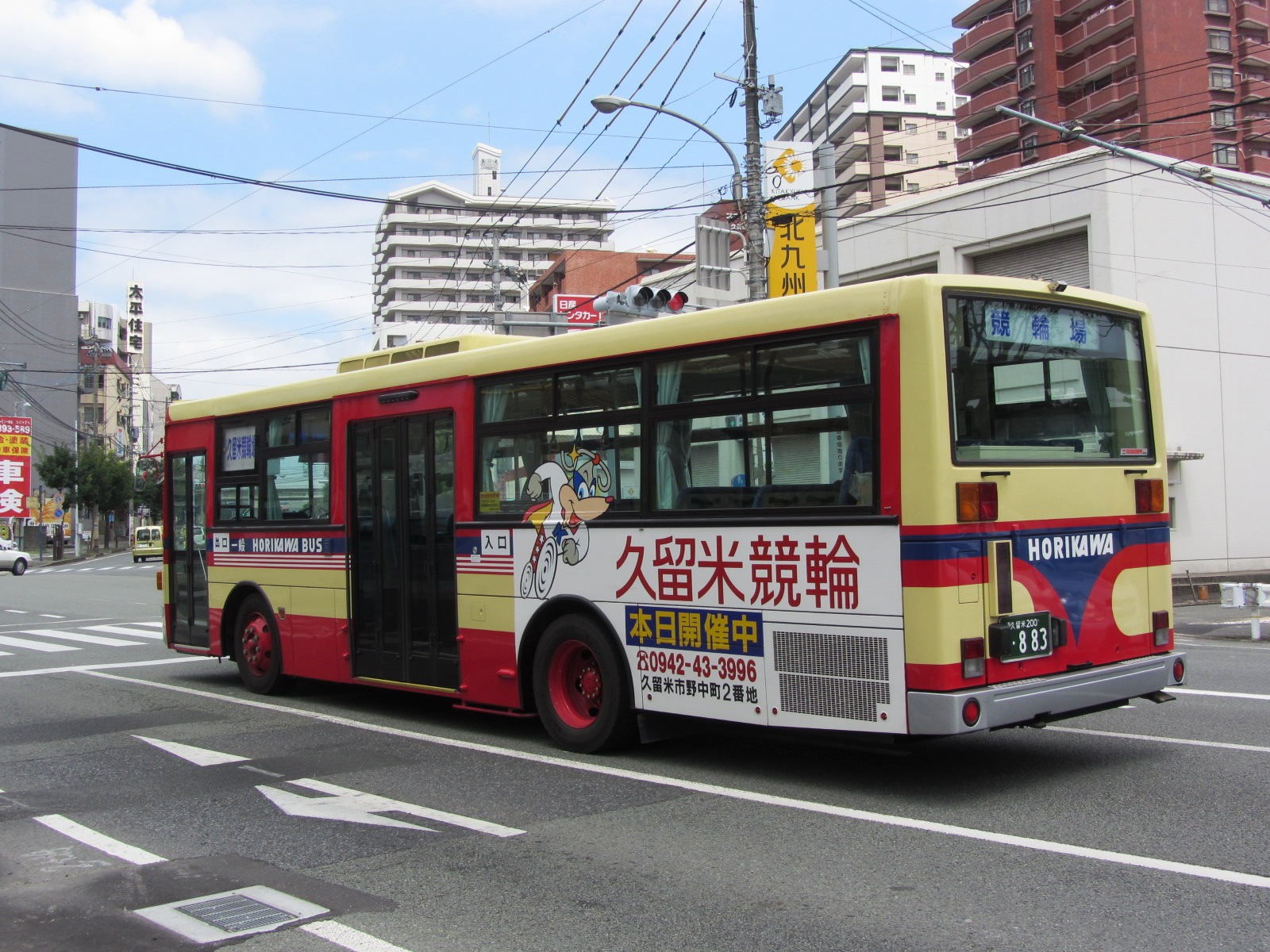 堀川バスが久留米競輪送迎バス向けにハーフラッピングを施した車両。